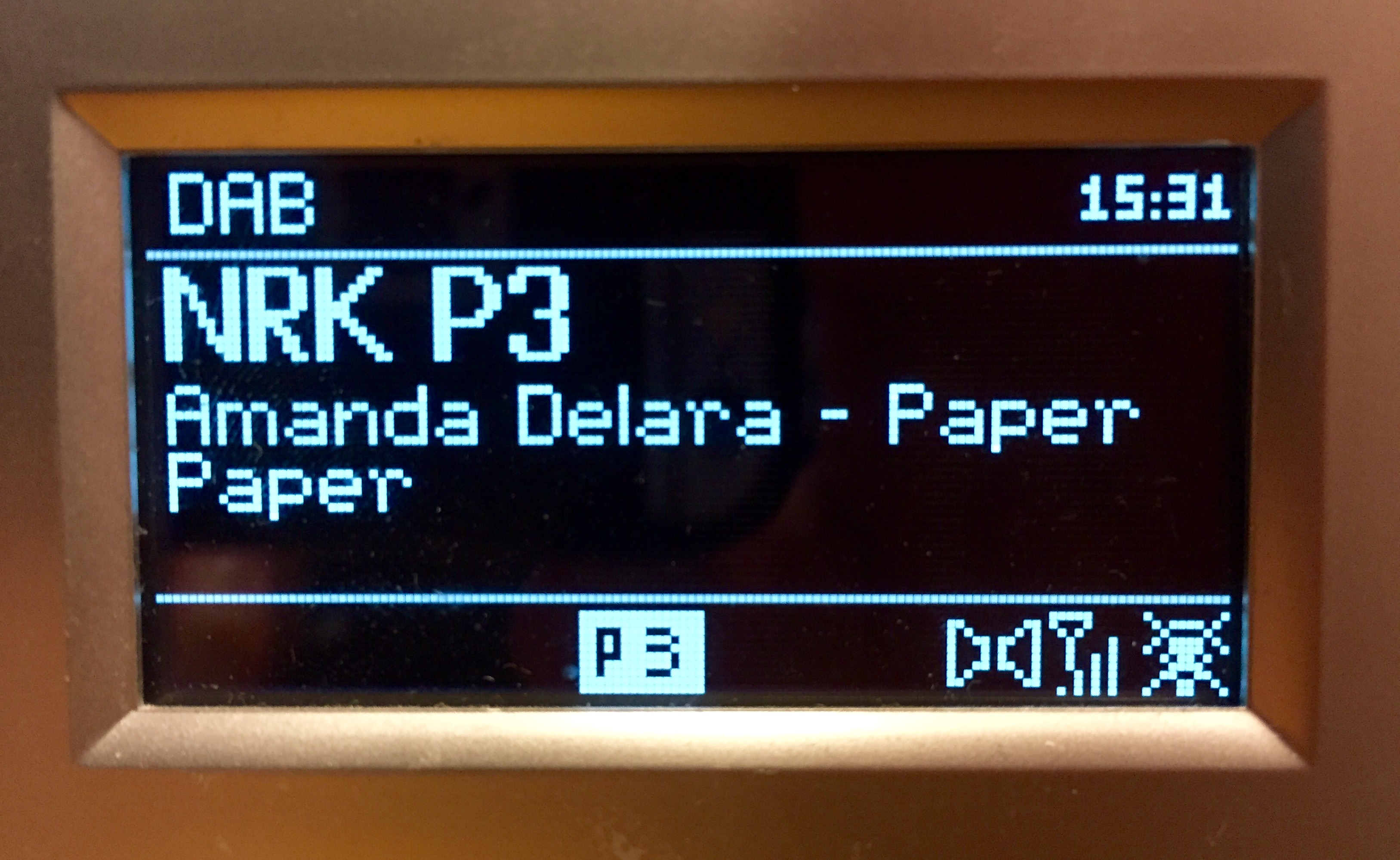 Dynamic label segment med artist - tittel info under kanalnavnet.